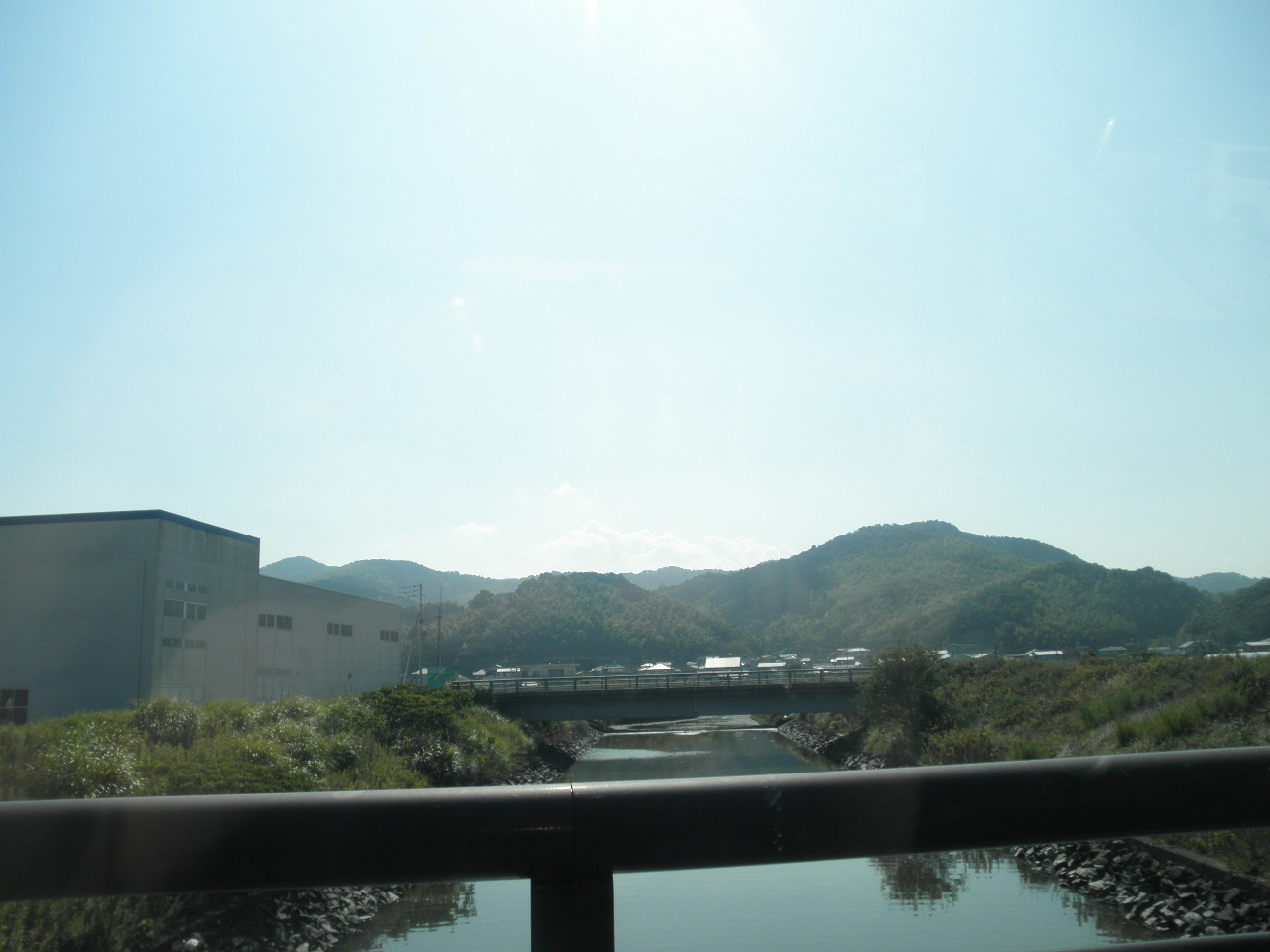 徳島県小松島市芝生町網干 芝生川